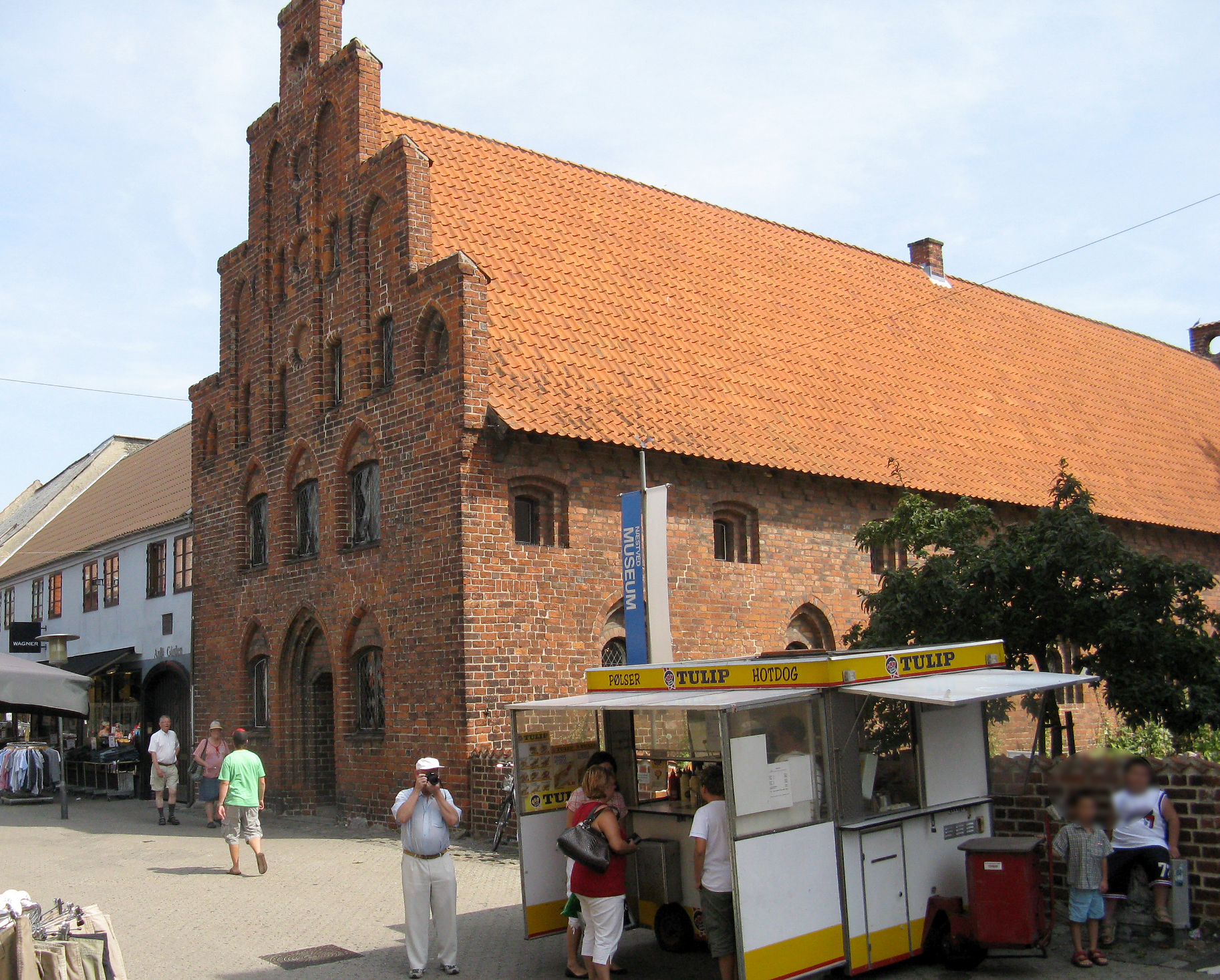 Helligaandshuset i Næstved